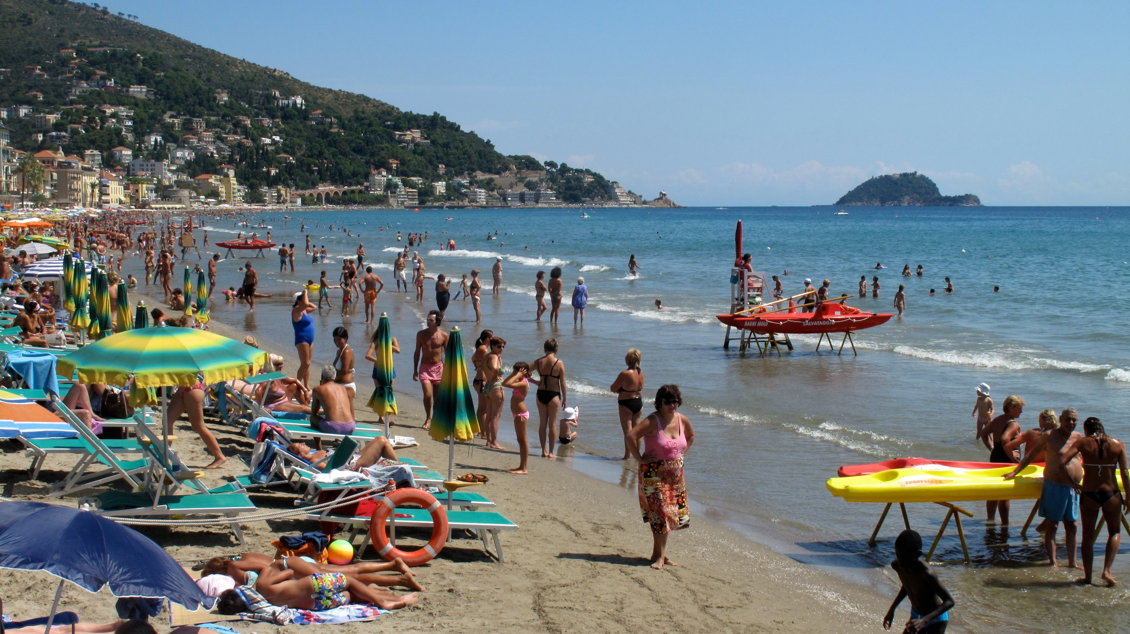 Visite 28.11.12